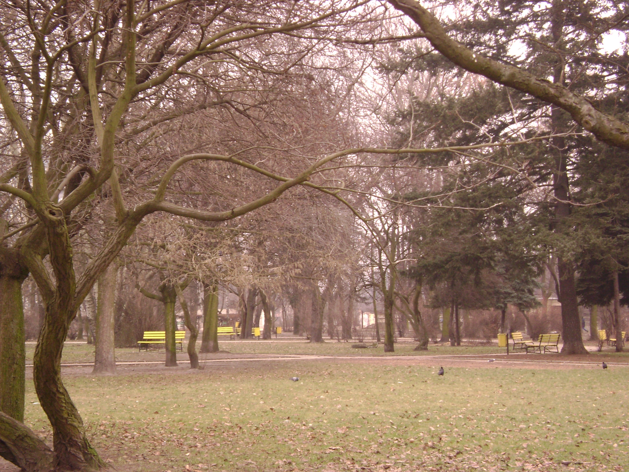 Widok na Park Miejski przy ul Leczniczej w Łodzi w styczniu 2009r. Widok od ul. Podmiejskiej.